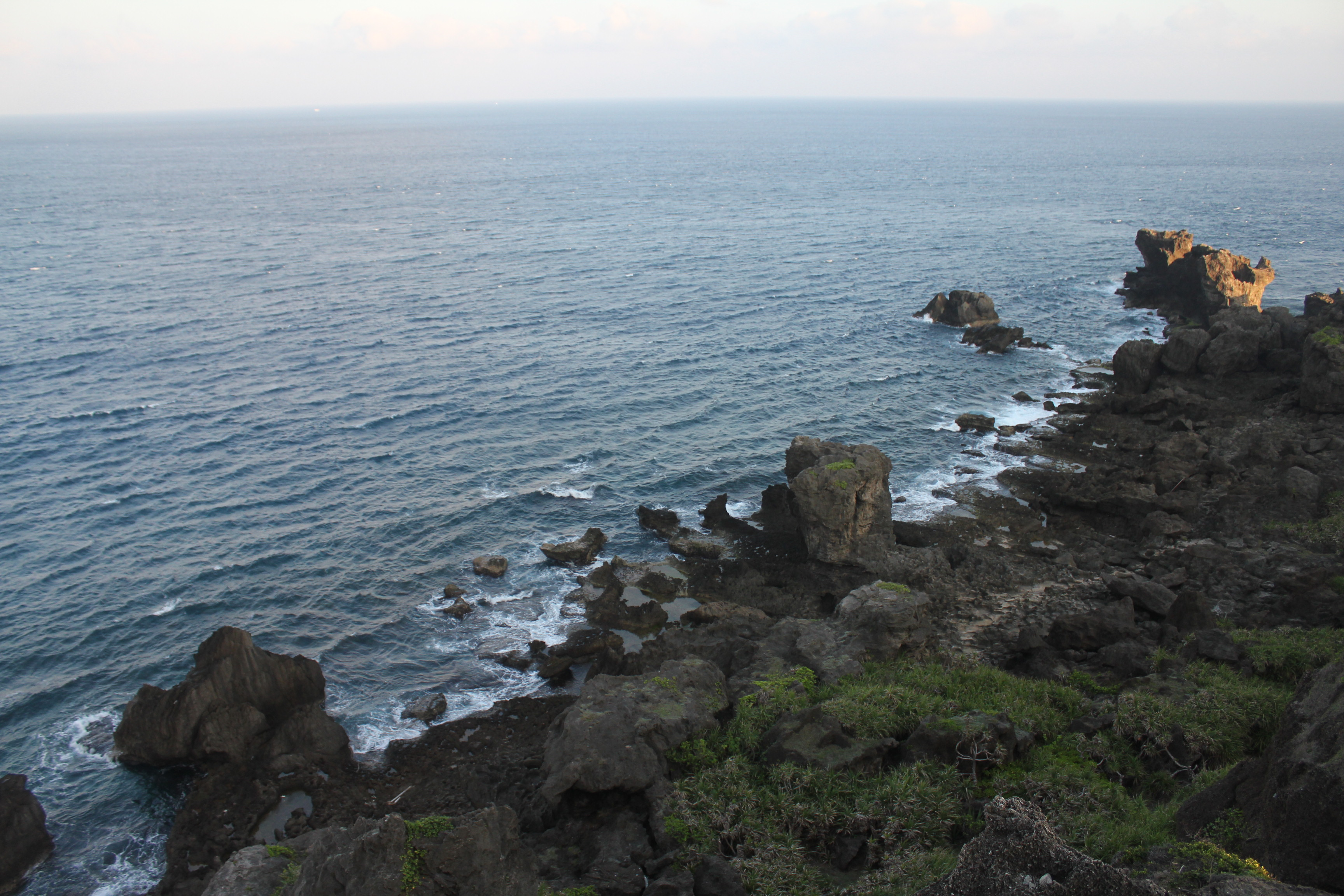 猫鼻头海岸